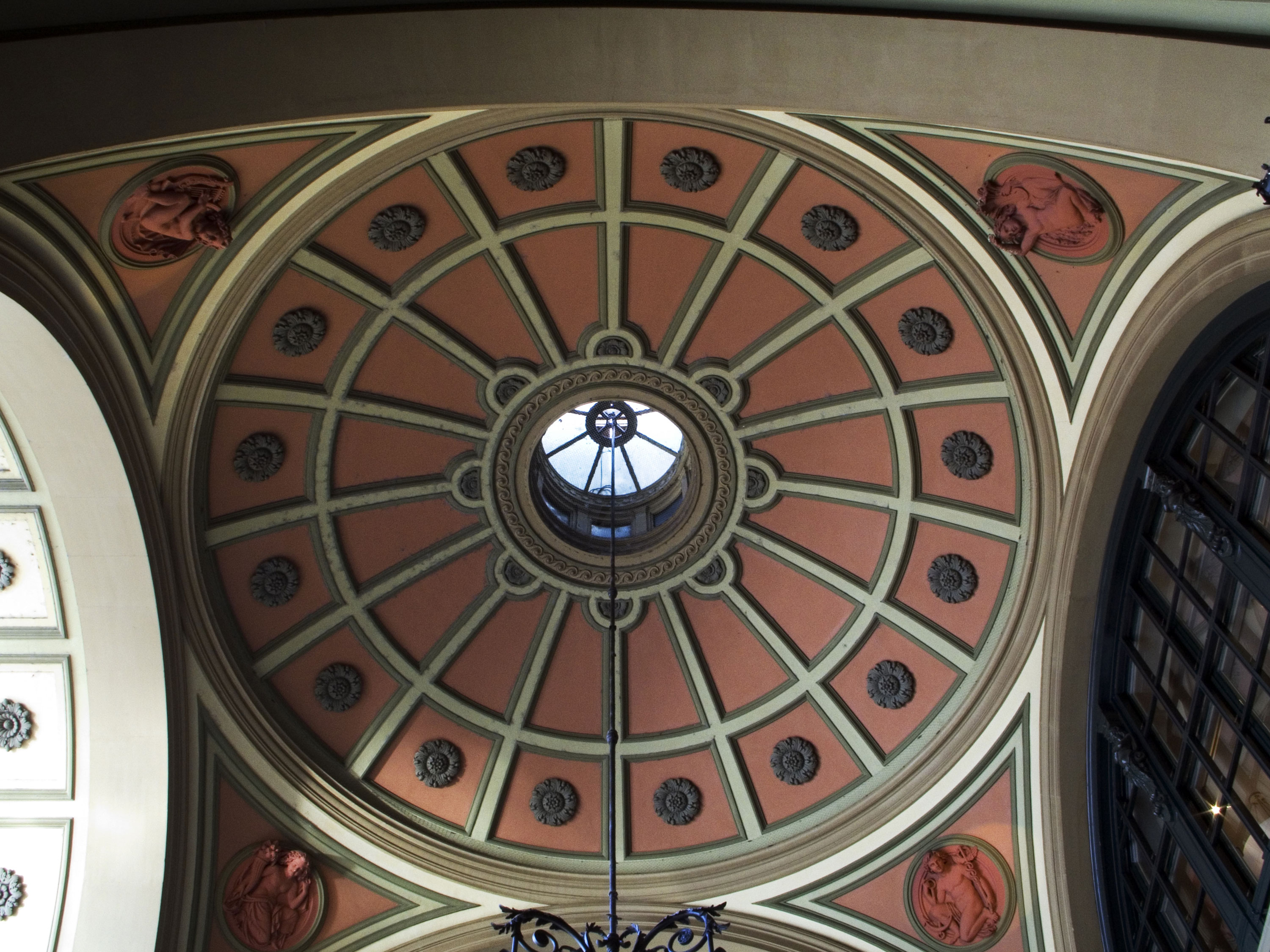 Zürich Hauptbahnhof, Kuppelhalle im Südtrakt